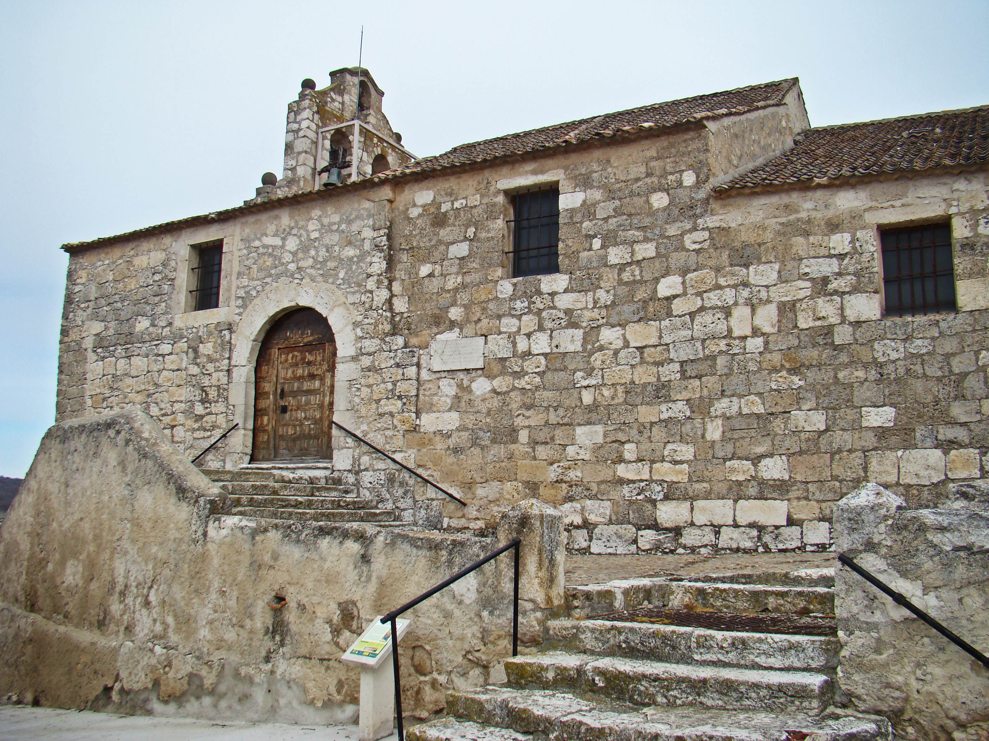 Iglesia románica de la Vera Cruz o Invención de la Cruz en la localidad segoviana de Cuevas de Provanco. Fue restaurada en 1991. Vista de las escaleras de acceso.